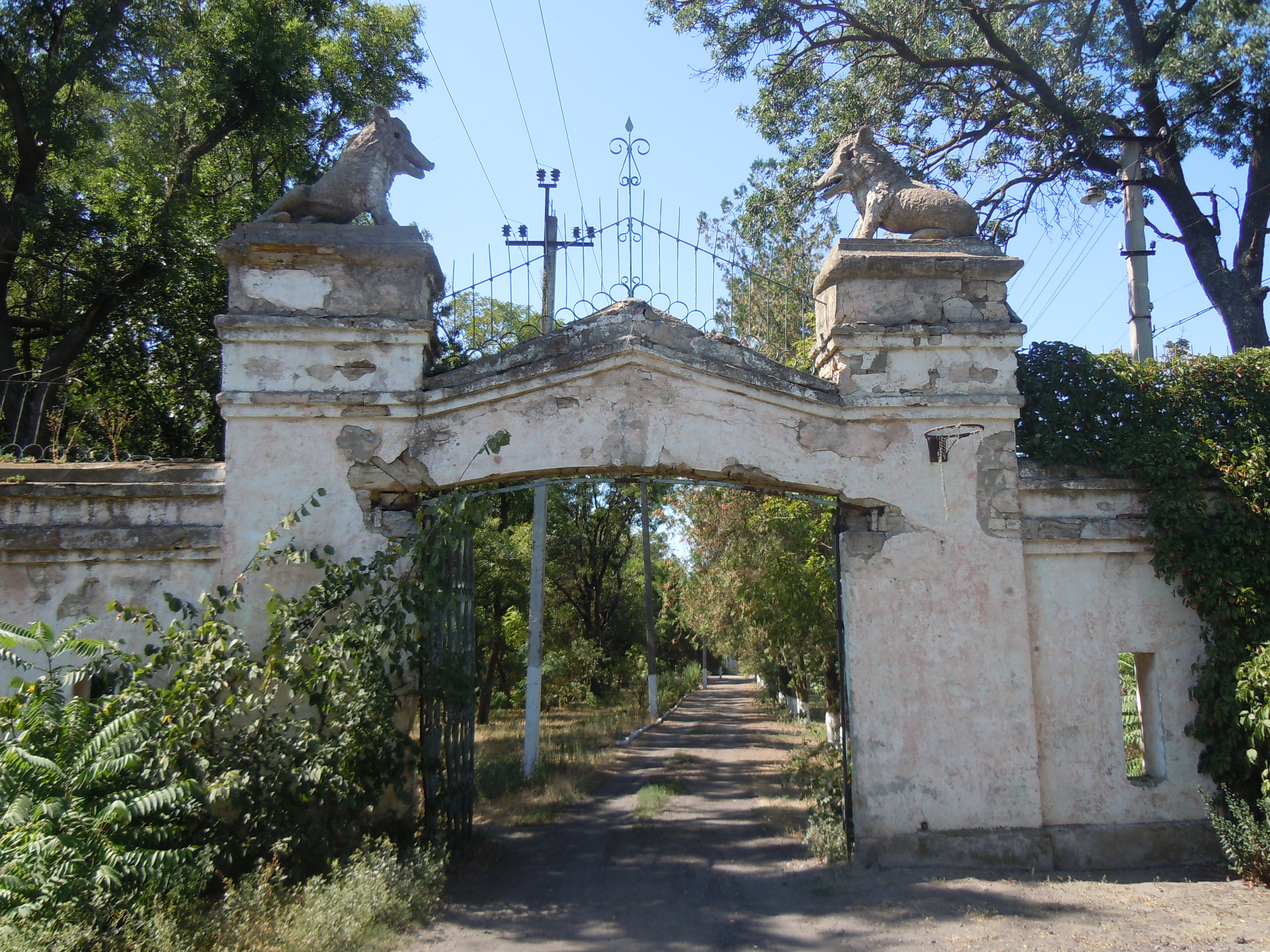 Брама маєтку Раухів у Завадівці